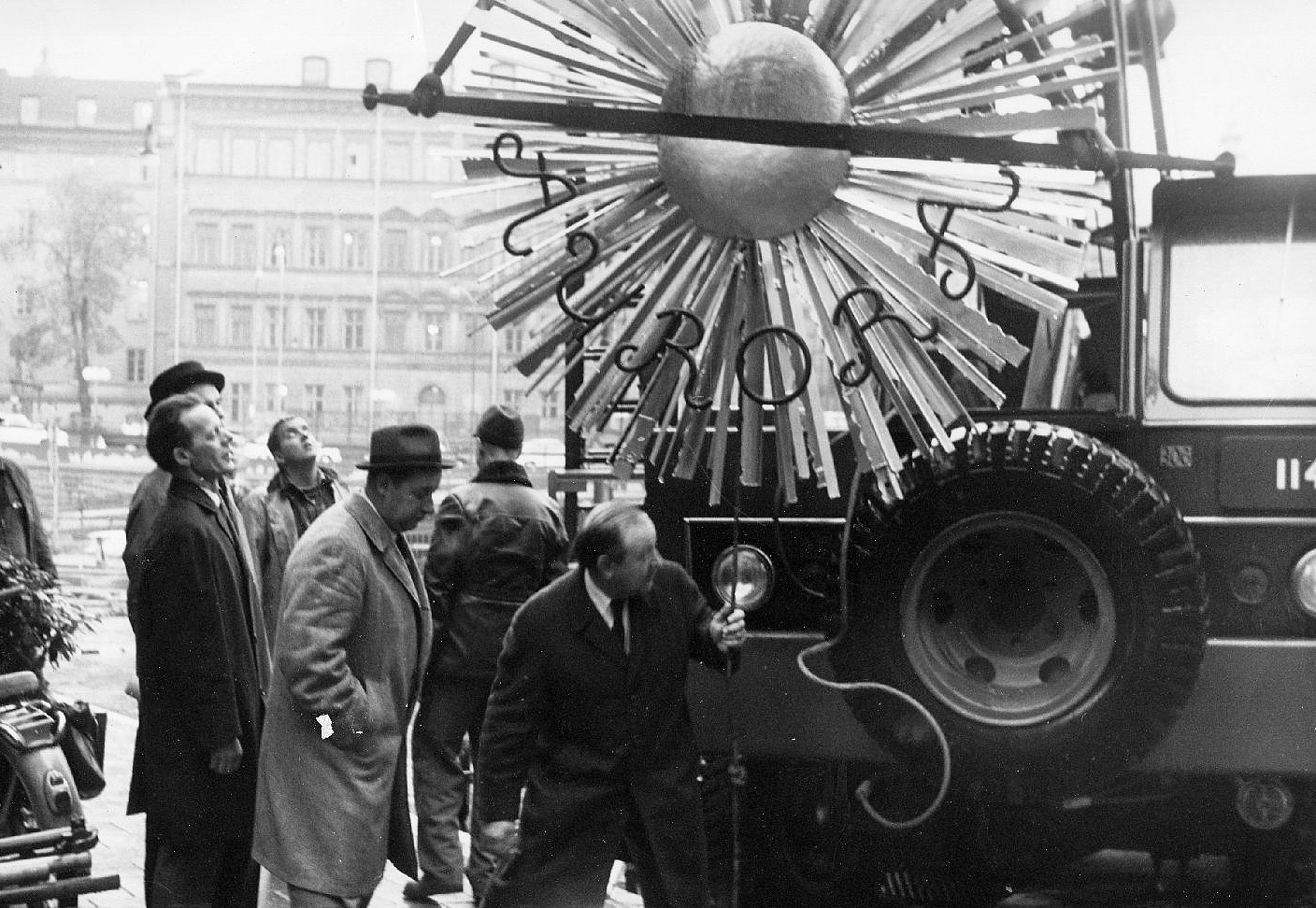 Källaren Auroras skylt sätts upp. Skylten ritad av Olle Nyman